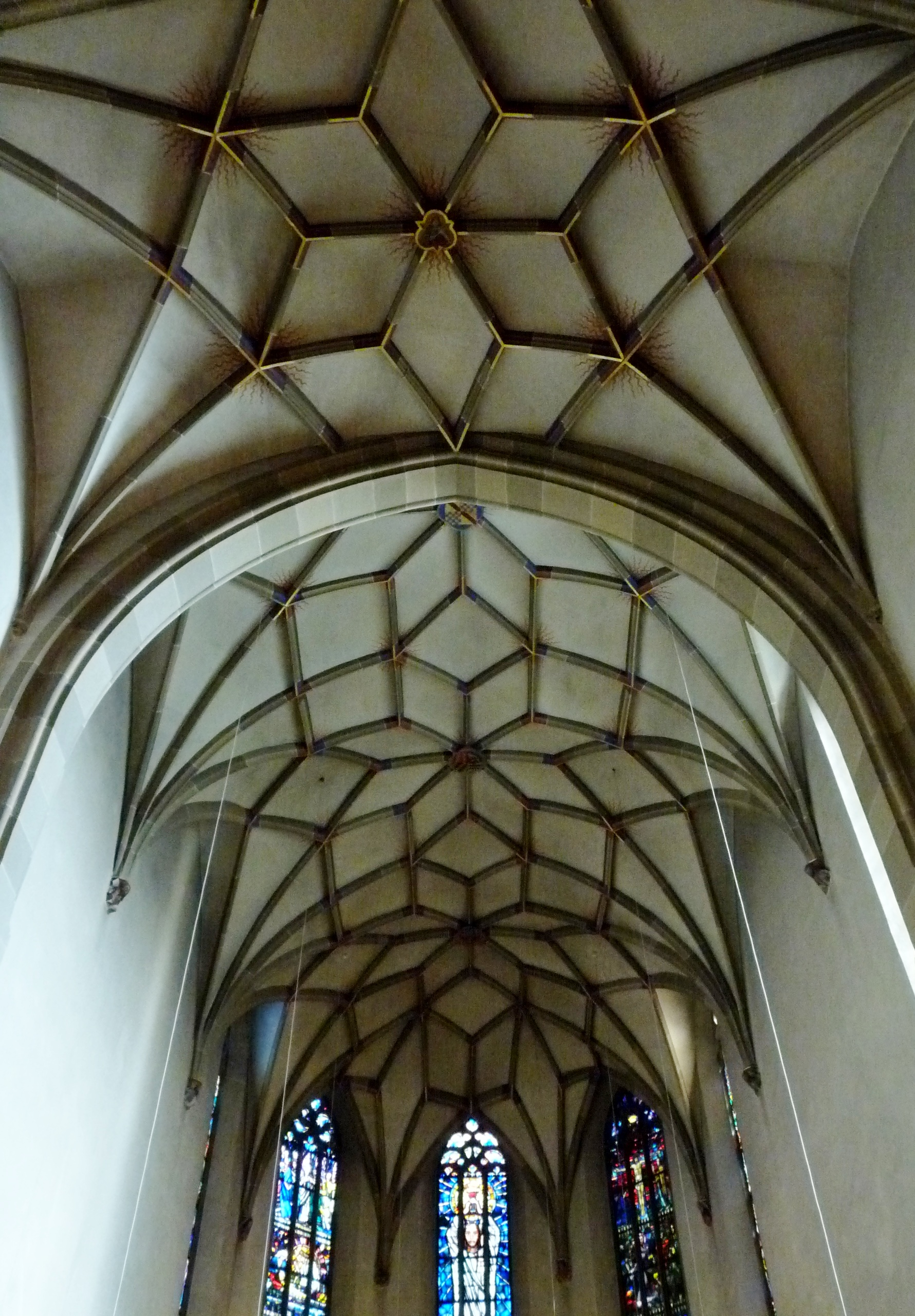 Backnang - Stiftskirche - Decke